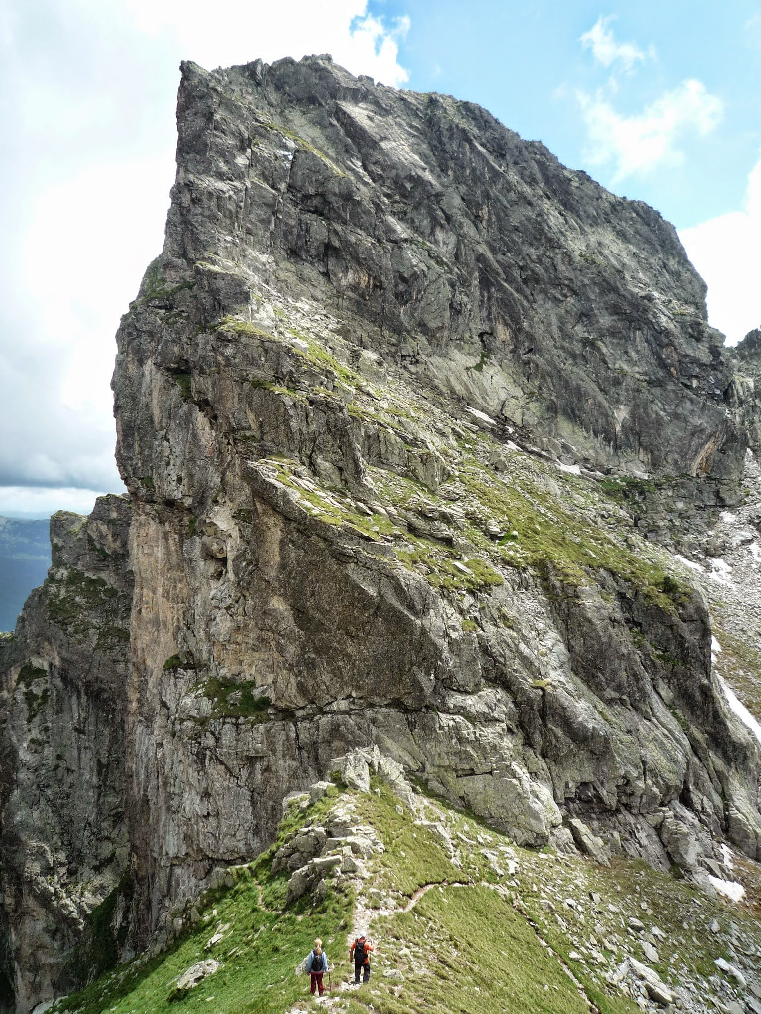 Злия зъб